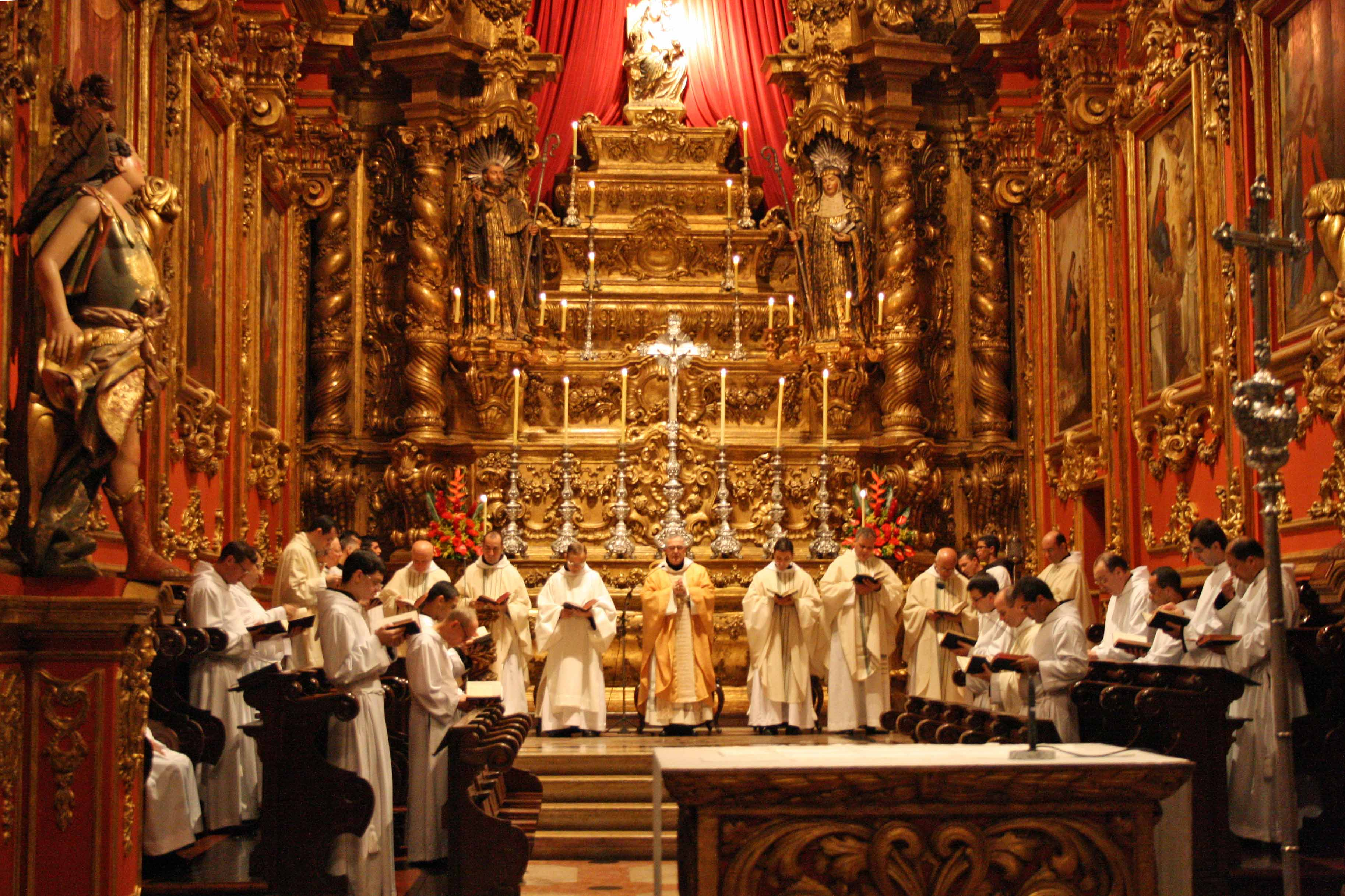 Mosteiro de São Bento do Rio de Janeiro - Natal de 2009 - Missa do Galo